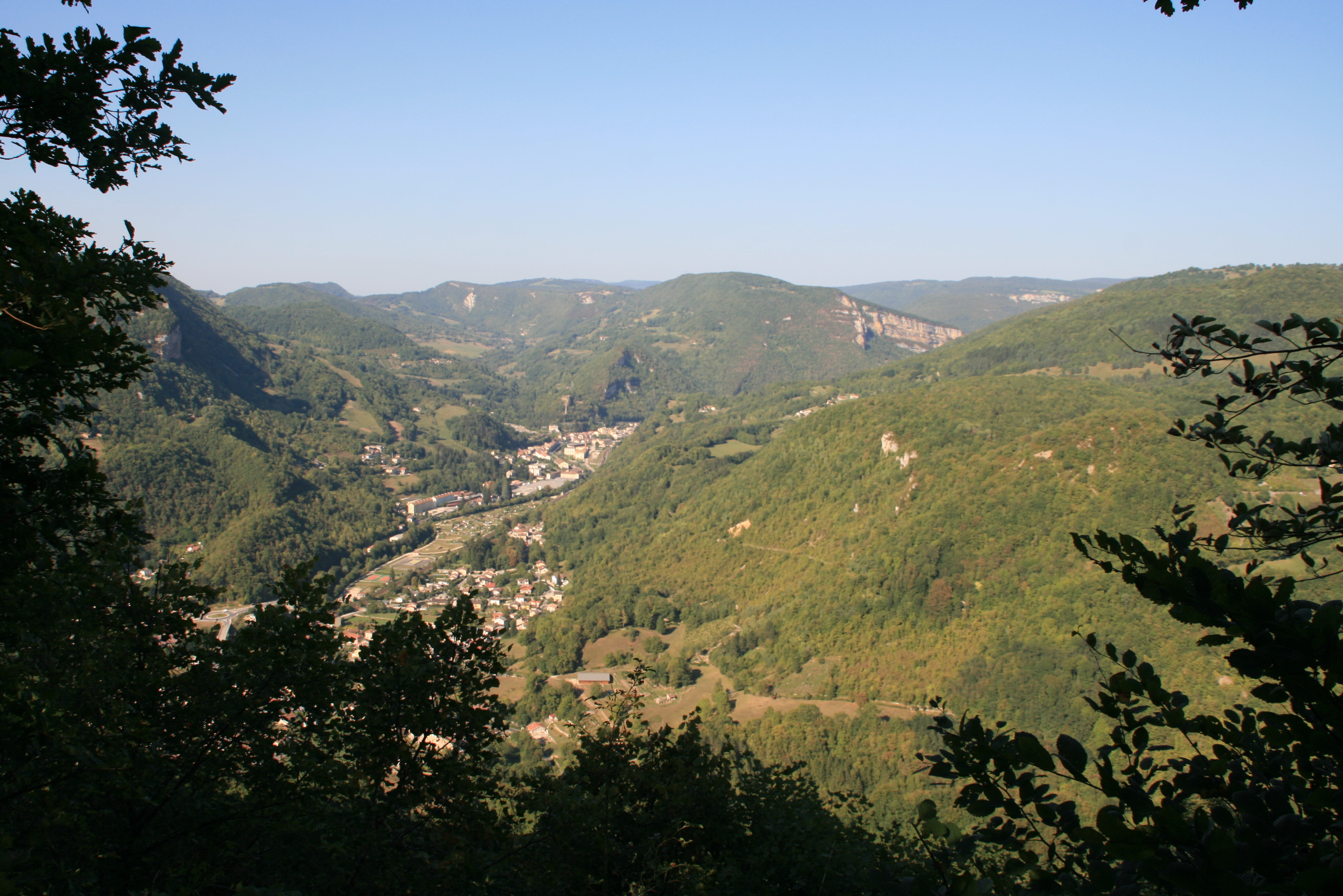 Saint-Rambert-en-Bugey, Vue des falaises.